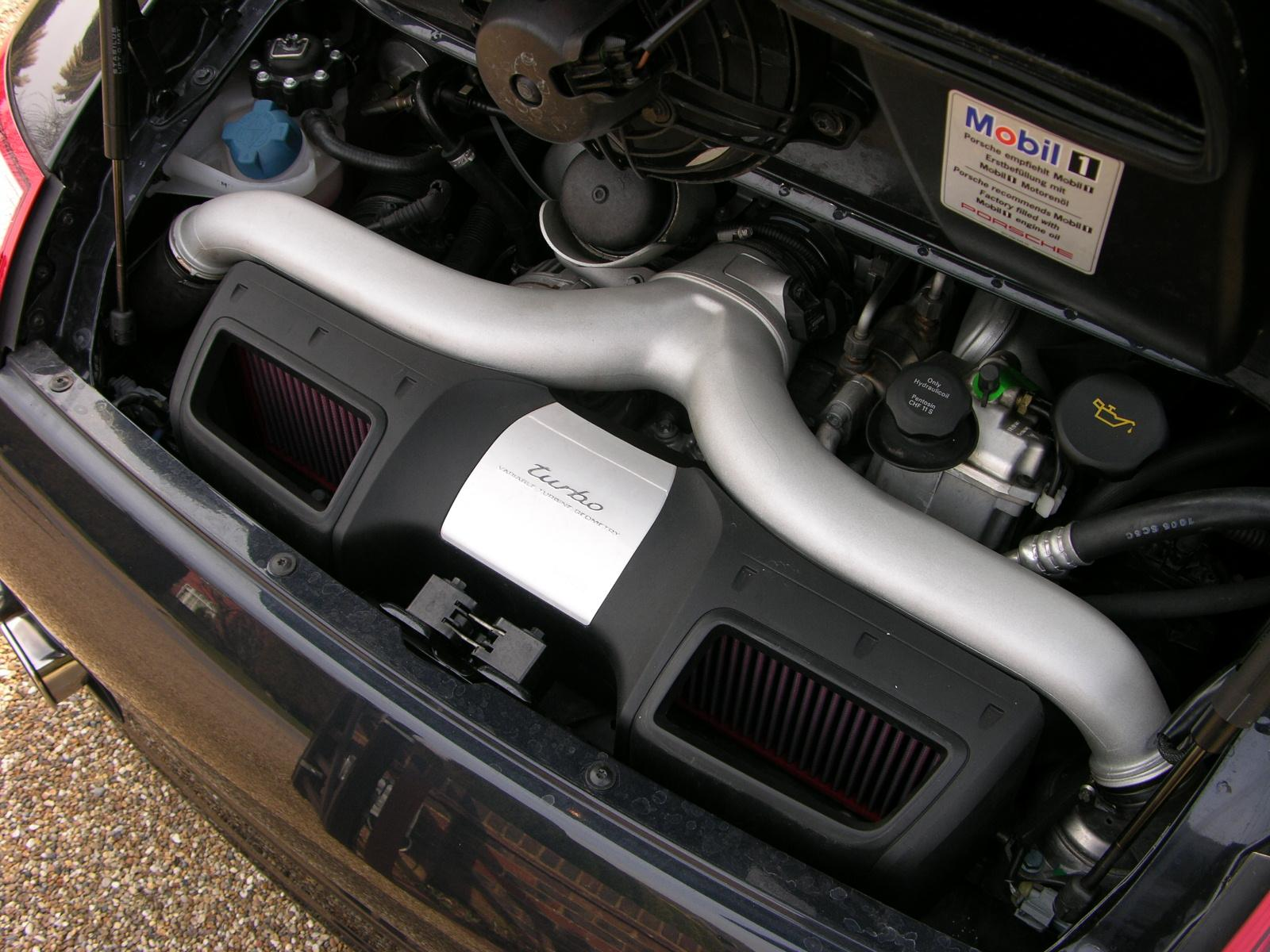 2006 Porsche 911 (997) Turbo